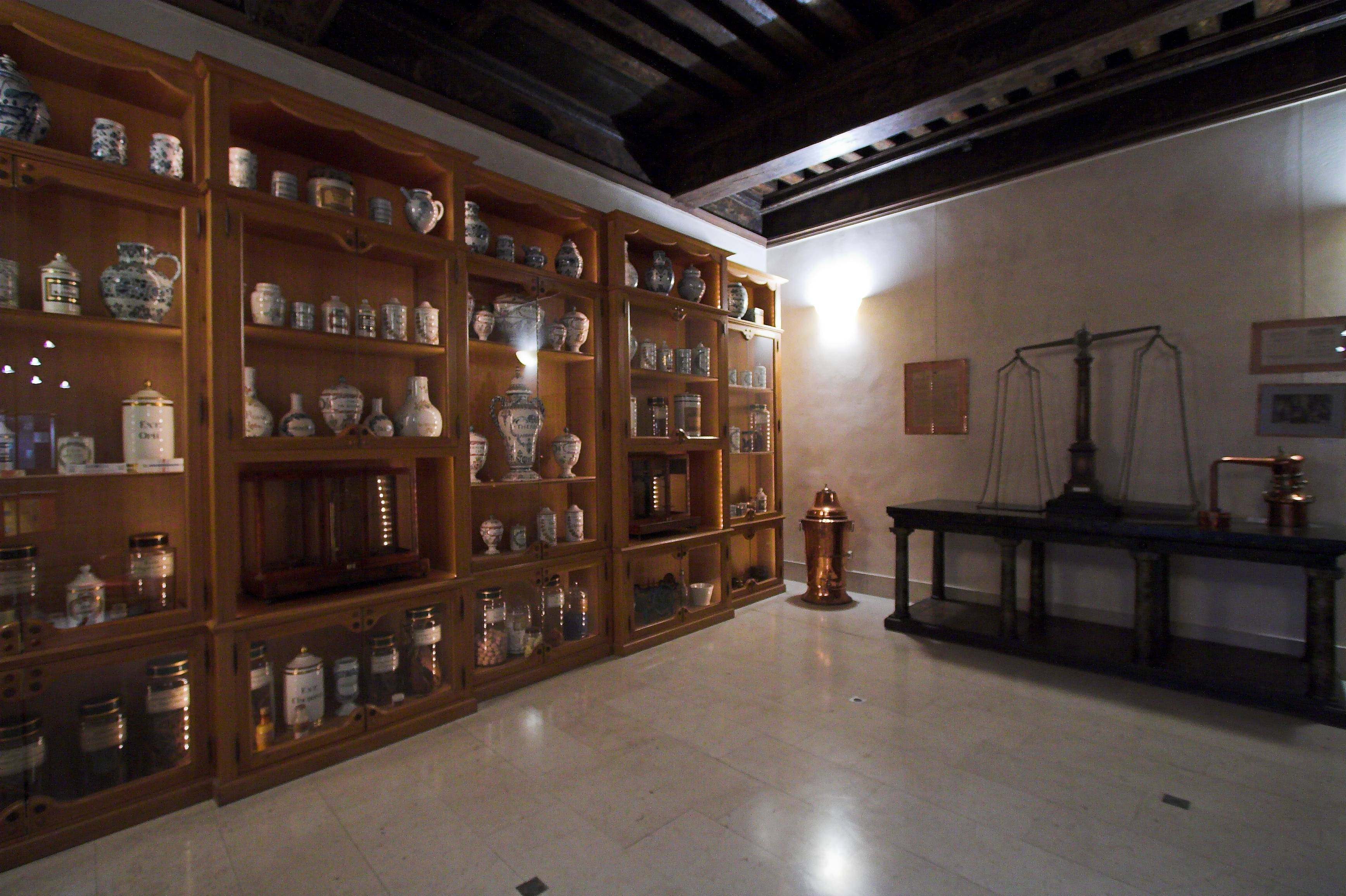 Musée de l'Assistance Publique-Hopitaux de Paris / Hôtel de Miramion(Paris, France)